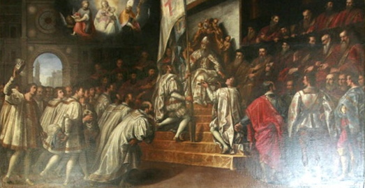 Gemälde von Jacopo Ligozzi (1547–1627)